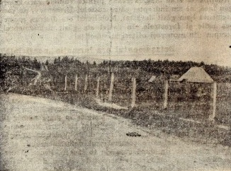 Platoul de deasupra comunei Beliş